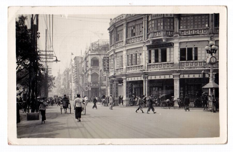 1937年，廣州市靖海路與長堤大馬路路口。